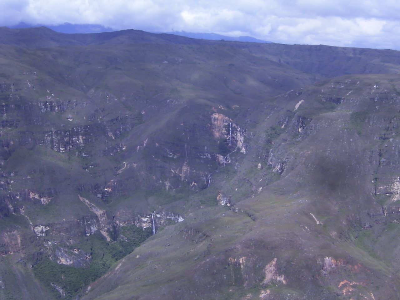 cataratas cerca del pueblo Huancas, Provincia de Chachapoyas, Amazonas, Peru.